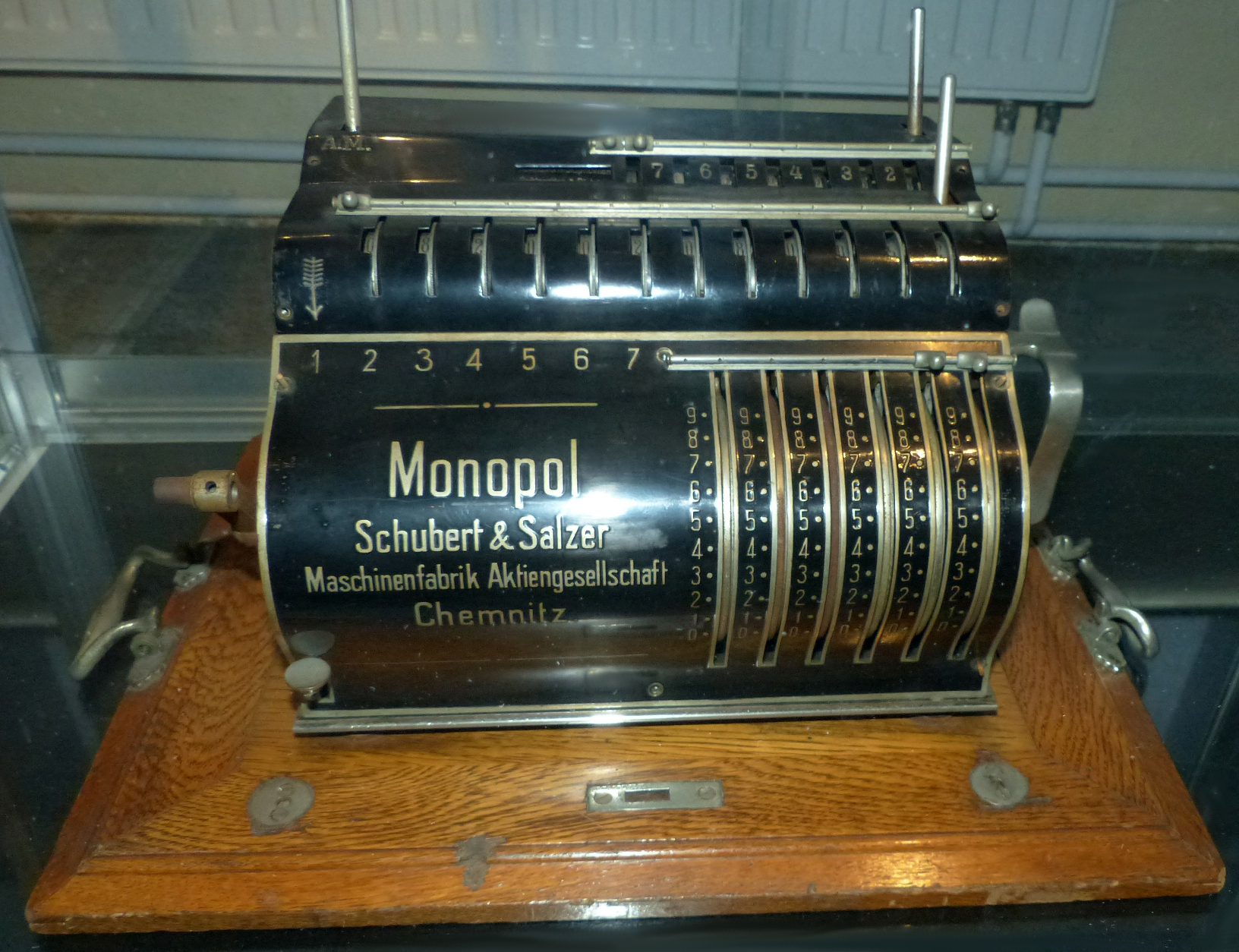 Rechenmaschine Monopol, Schubert & Salzer Maschinenfabrik AG, Chemnitz 1920; Exponat in den Technischen Sammlungen Dresden